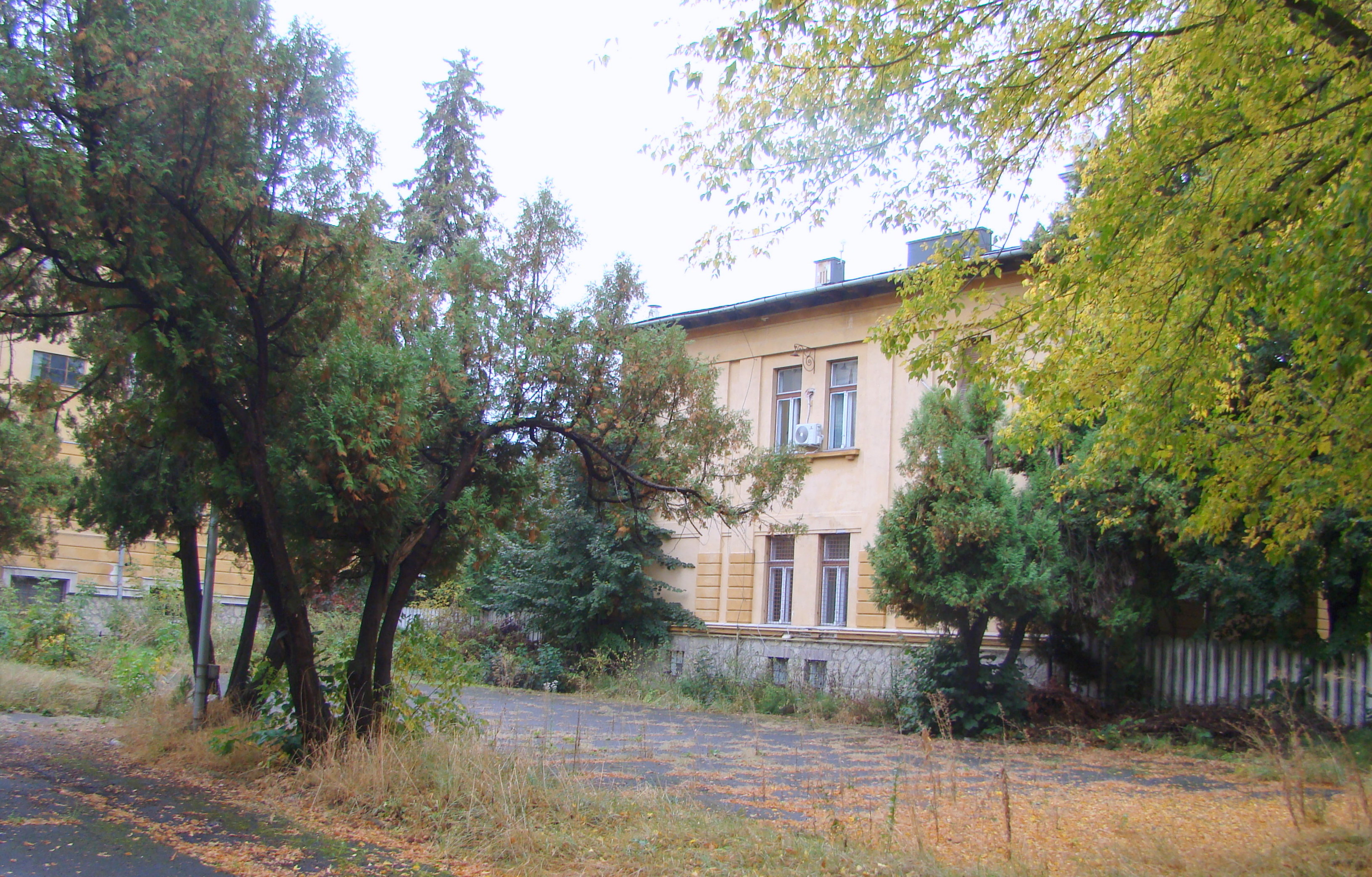 Ansamblul „Fabrica de Tutun”, municipiul Sfântu Gheorghe, str. Kós Károly 21-25 1902 - 1910